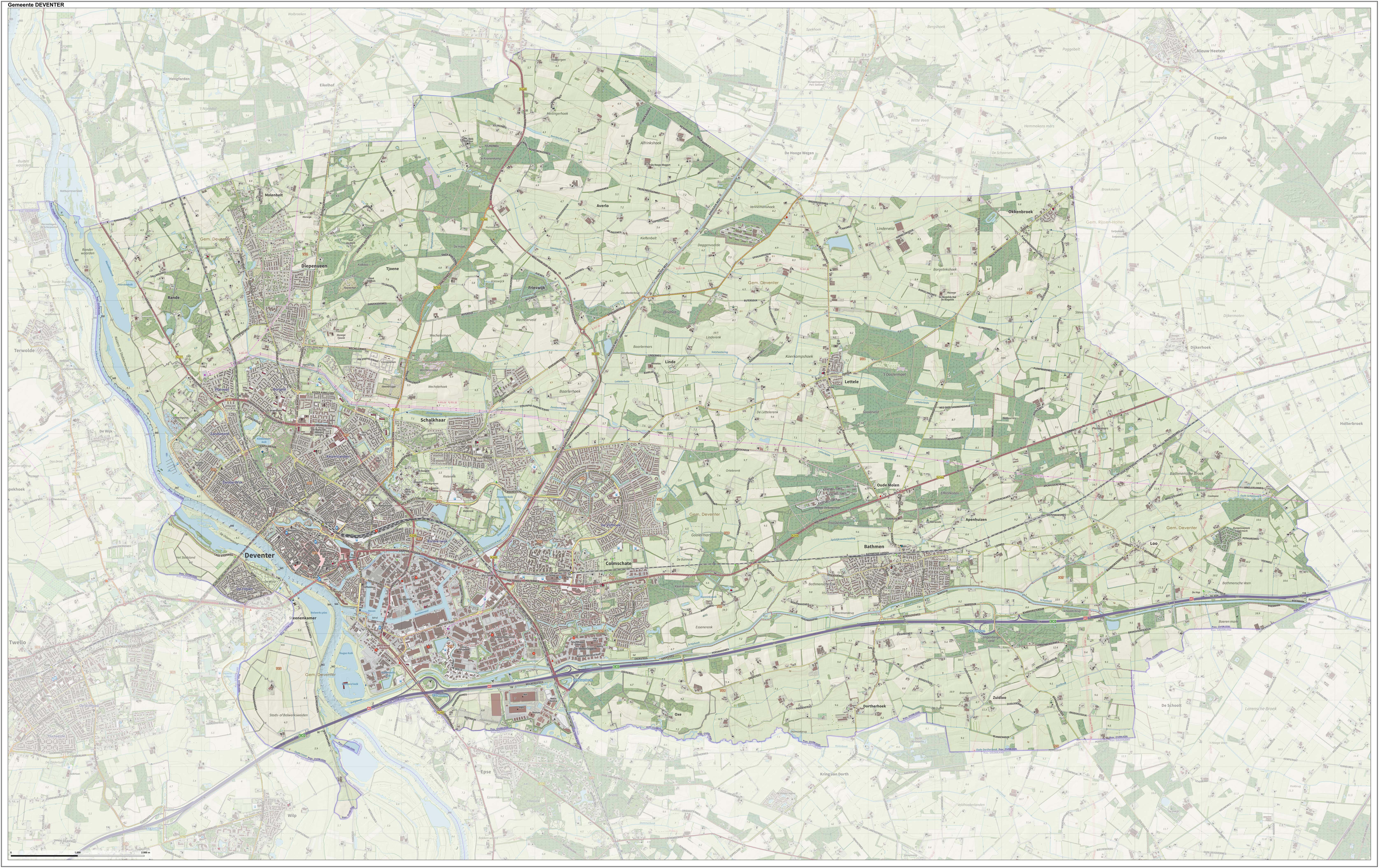 Topografische gemeentekaart. Resolutie: 400 pixels/km. Kaartbeeld samengesteld uit de open geodata van de Top10NL en Top25namen (Kadaster), Creative Commons-BY licentie. Gebouwvlakken uit open geodata BAG extract. Wegen uit de OpenStreetMap, OpenStreetMap community. Reliëfschaduw uit de Actuele Hoogtekaart AHN2. Samenstelling en kleurenschema: Jan-Willem van Aalst, met QGIS. Zie ook de Legenda.